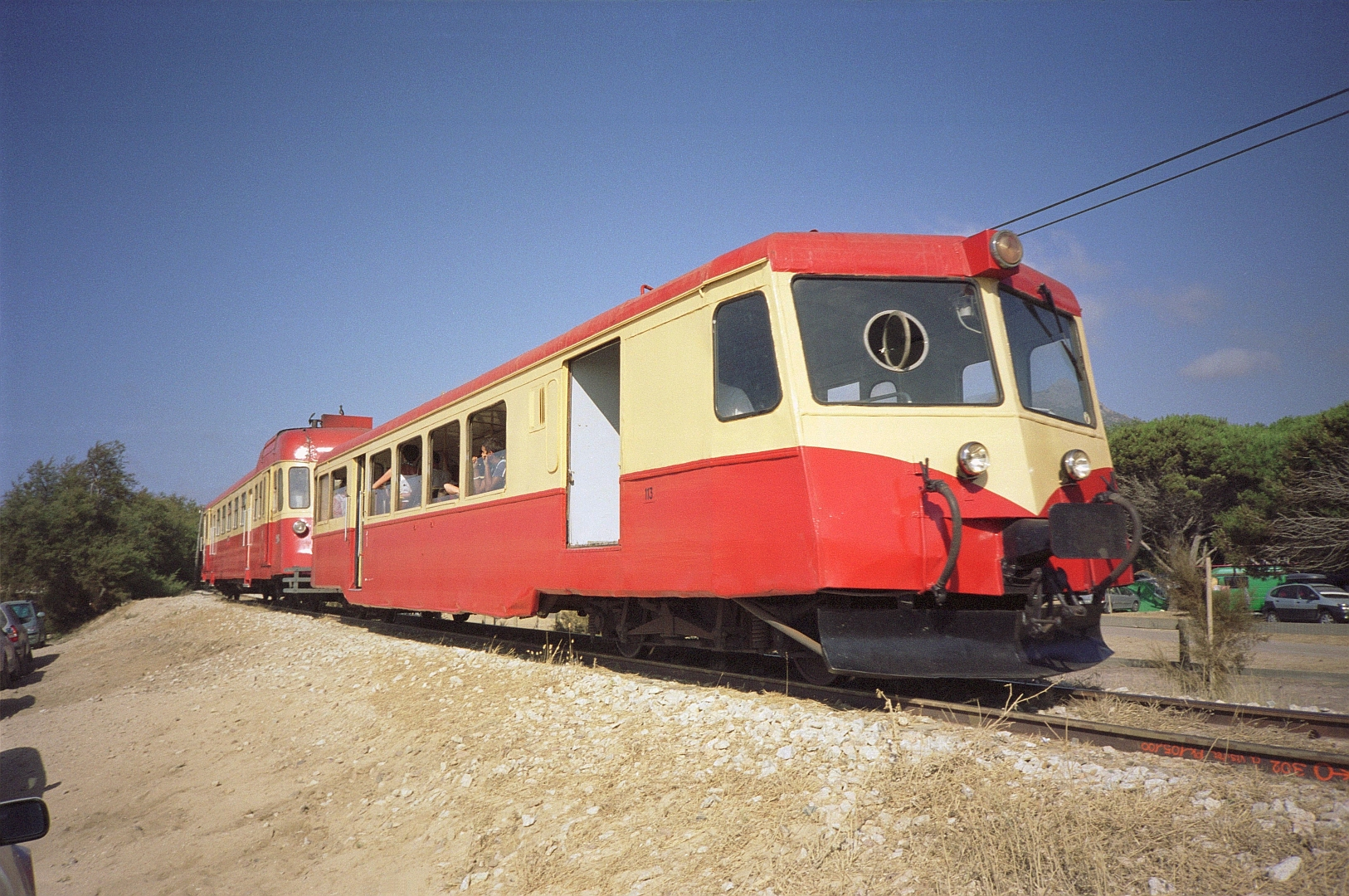 L'autorail ABH8 N°206 et la remorque XR 113 des chemins de fer de la Corse, à Aregno-plage le 20 juillet 2005.